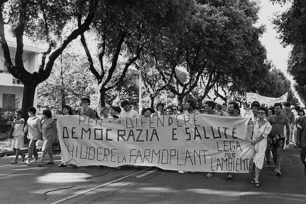 Cittadini di Massa (MS) in corteo chiedono la chisura definitiva di Farmoplant dopo l'incendio del 1988